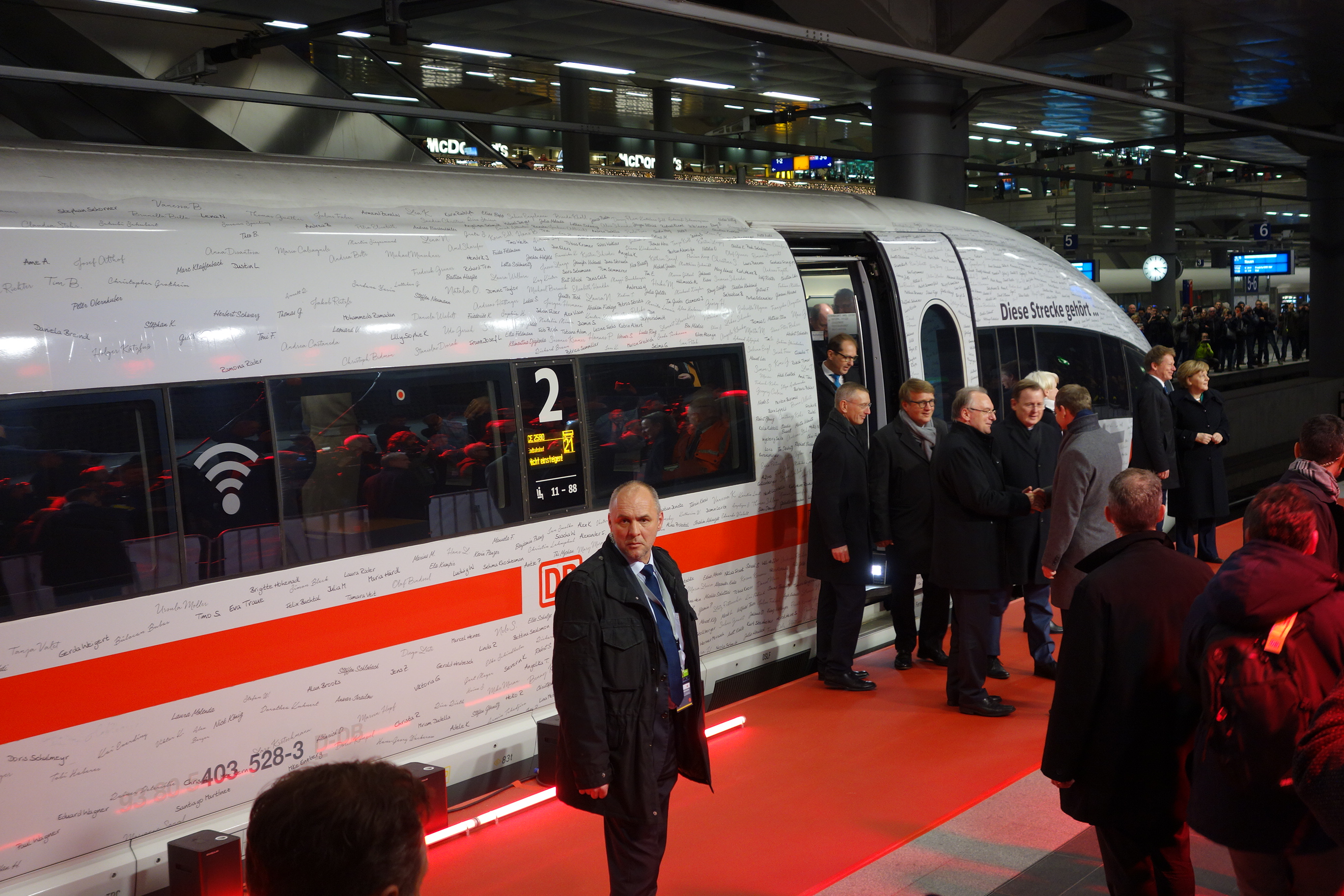 Eröffnungsfahrt auf der Neubaustrecke Nürnberg-Erfurt, ICE3-Triebzug mit Politik-Prominenz bei der Ankunft in Berlin Hauptbahnhof